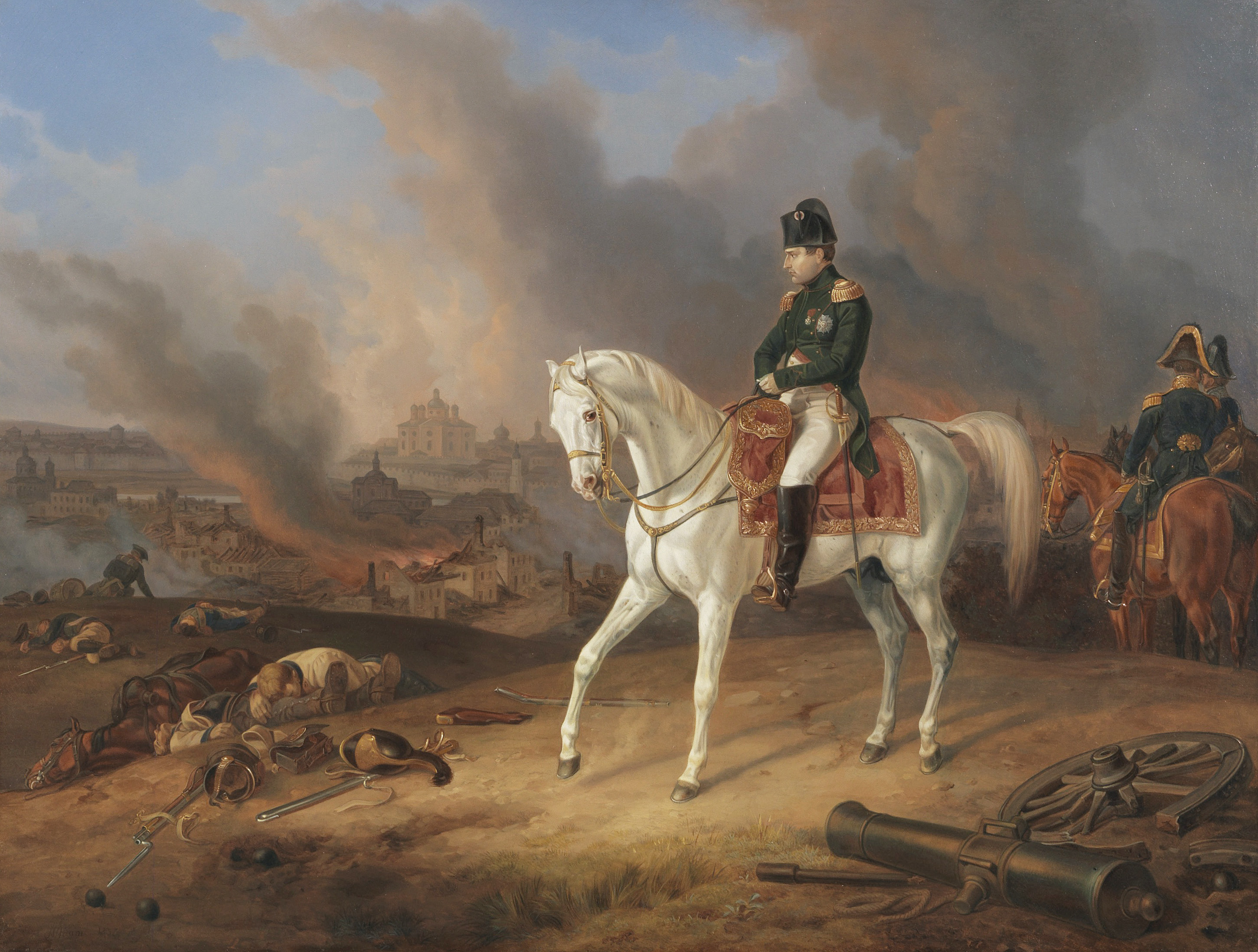 Napoleon vor dem brennenden Smolensk (1812). Öl auf Leinwand. Links unten signiert und datiert. 59,7 x 78,5 cm